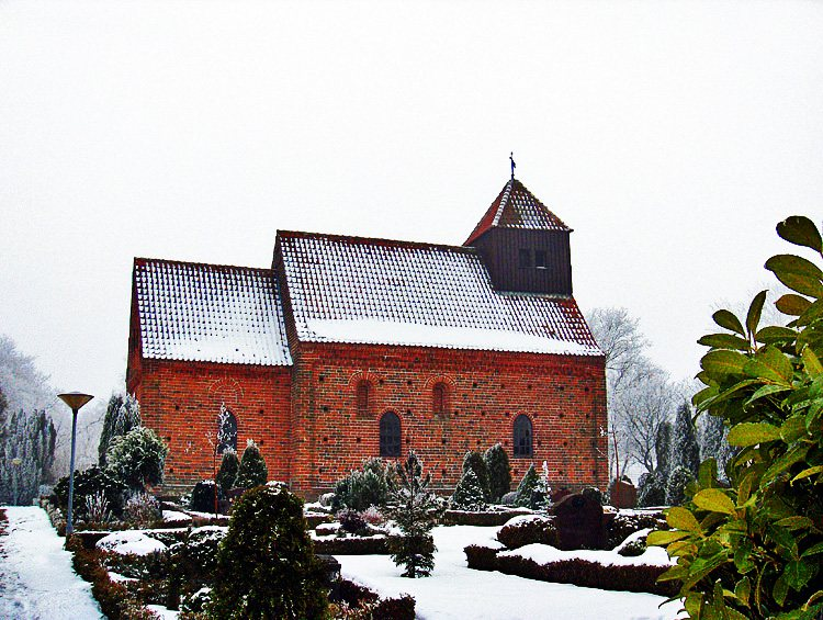 fra nord